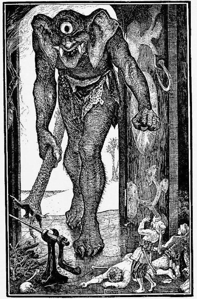 Sinbad the sailors third voyage. Encounter with a man-eating giant.